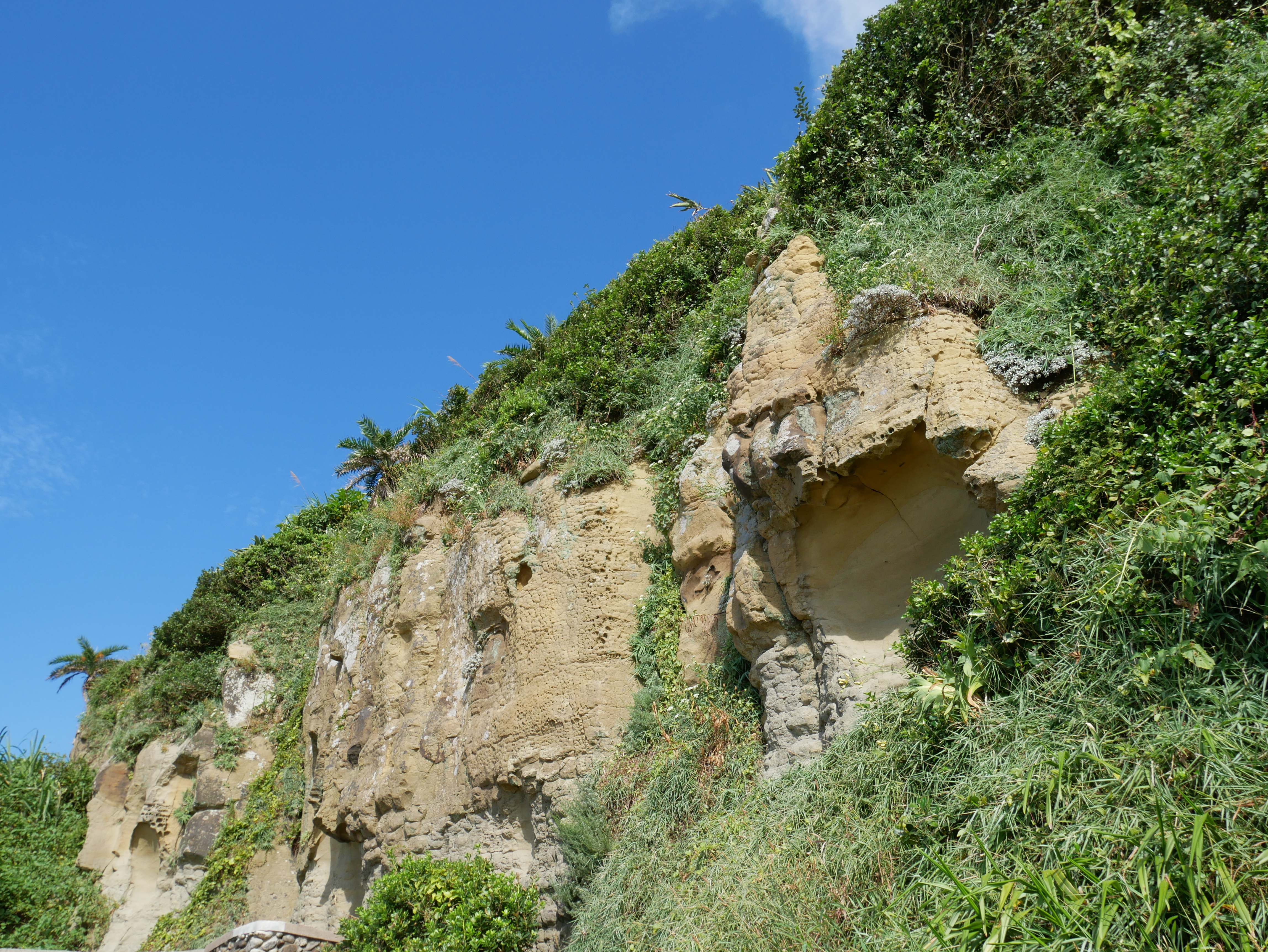 中文（台灣）: 和平島公園海蝕崖，基隆市中正區平寮里